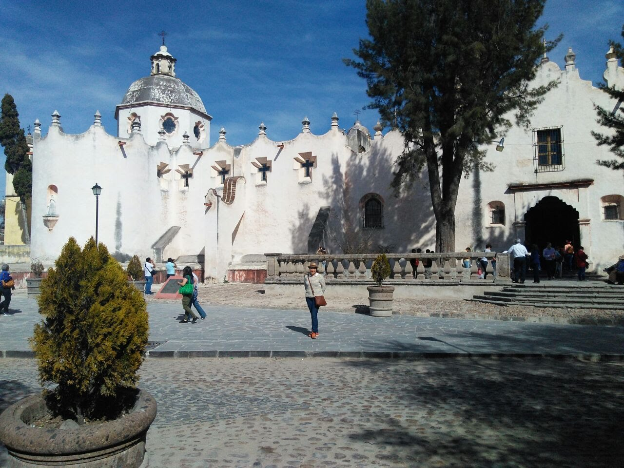 Santuario de Jesús Nazareno de Atotonilco6